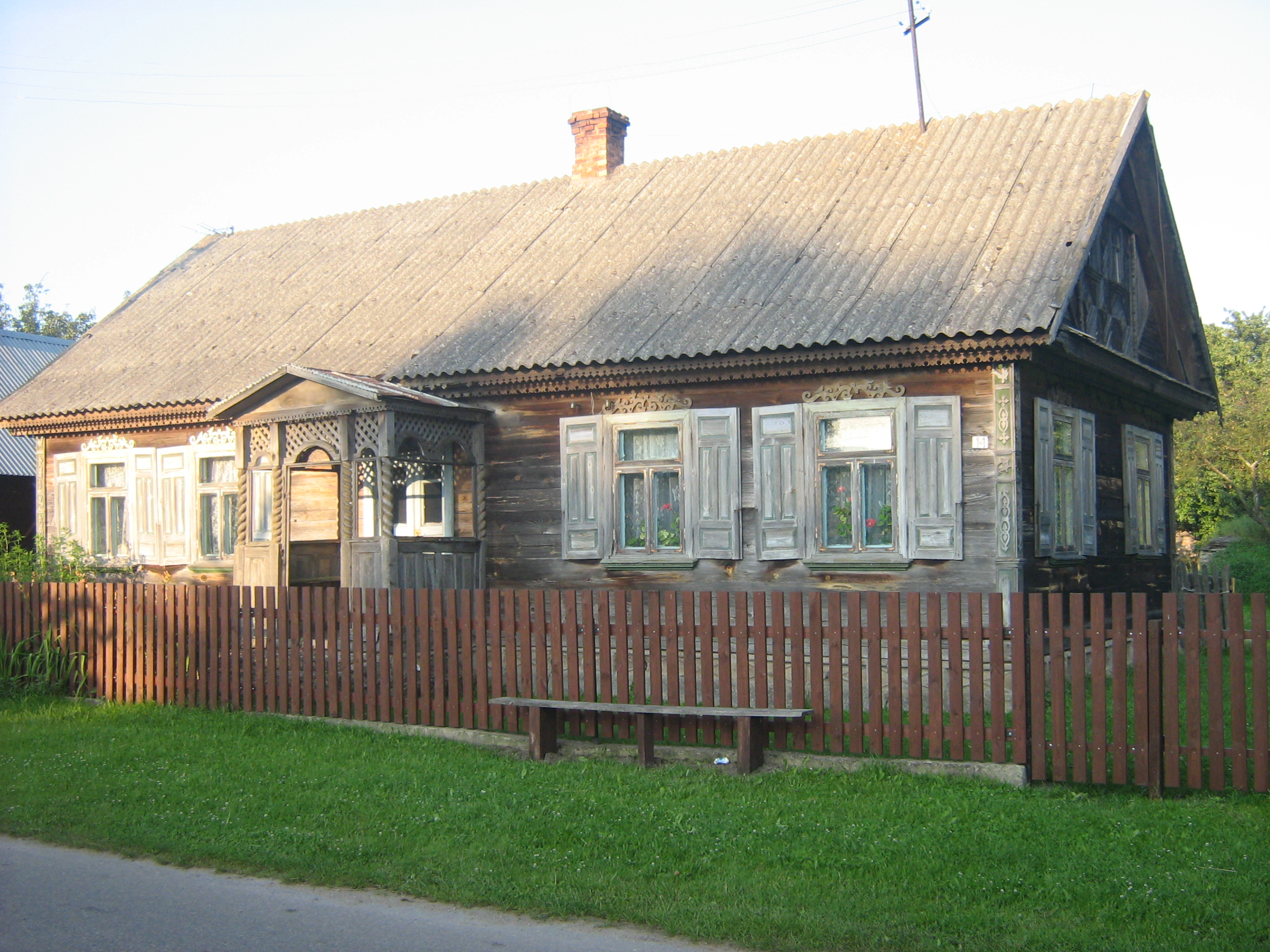 Dom z numerem "14" Trywieży.